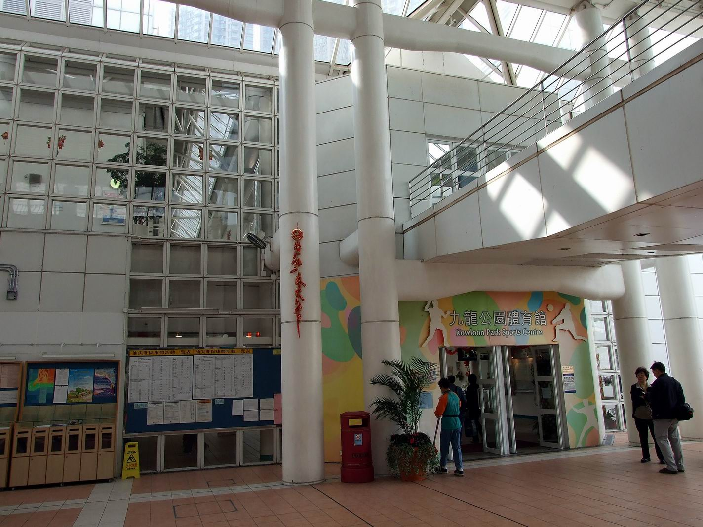 中文（香港）: 九龍公園室內運動場入口